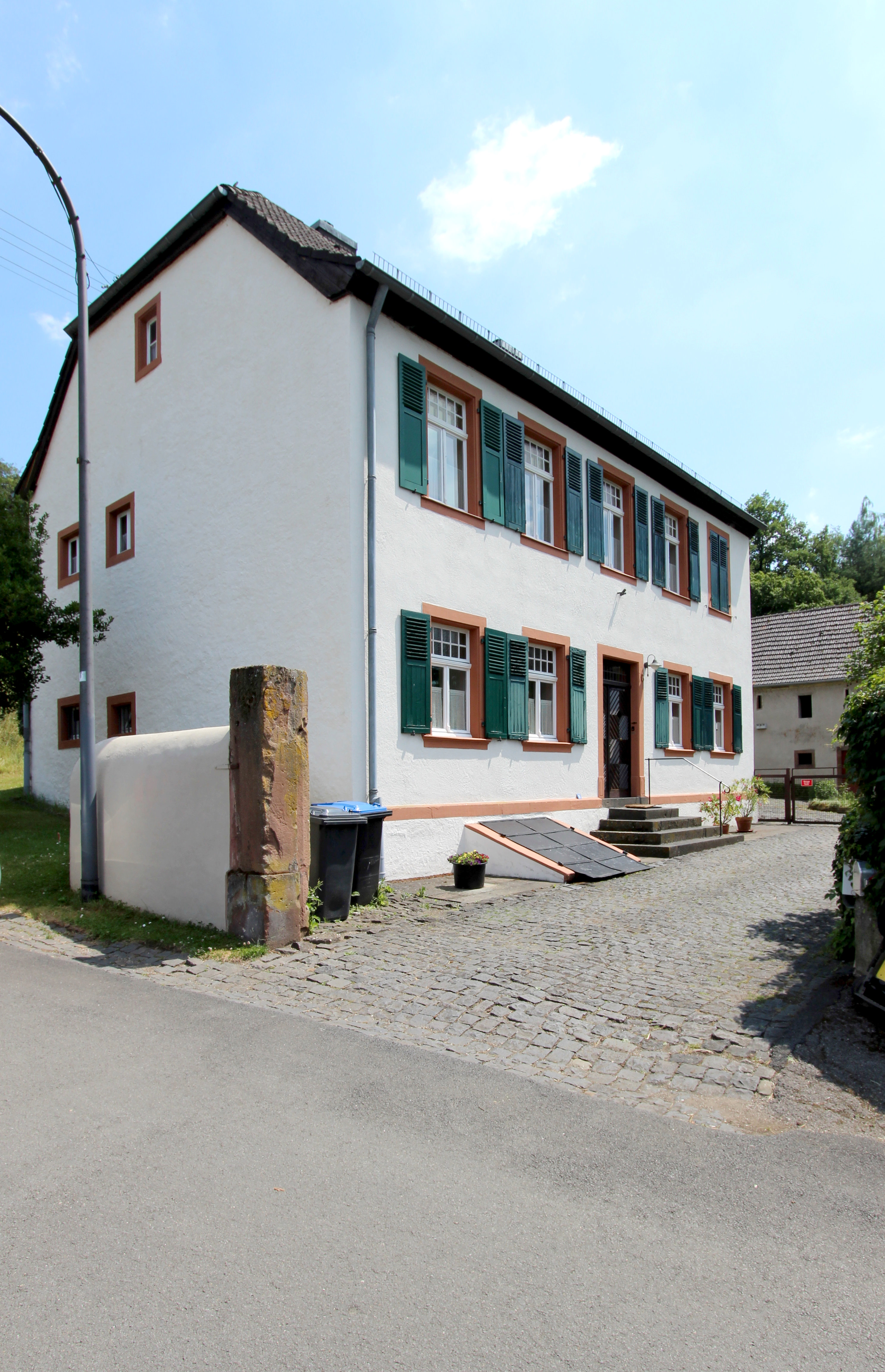 54570 Rockeskyll, Im Überecken 6. Ehemaliger Pfarrhof; Krüppelwalmdachbau, winkelförmig angeordnete Wirtschaftsgebäude, 1826. Aufnahme von 2018.